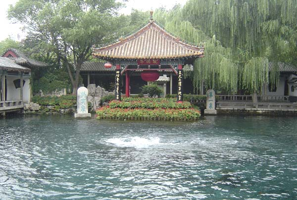 济南 趵突泉 2005年